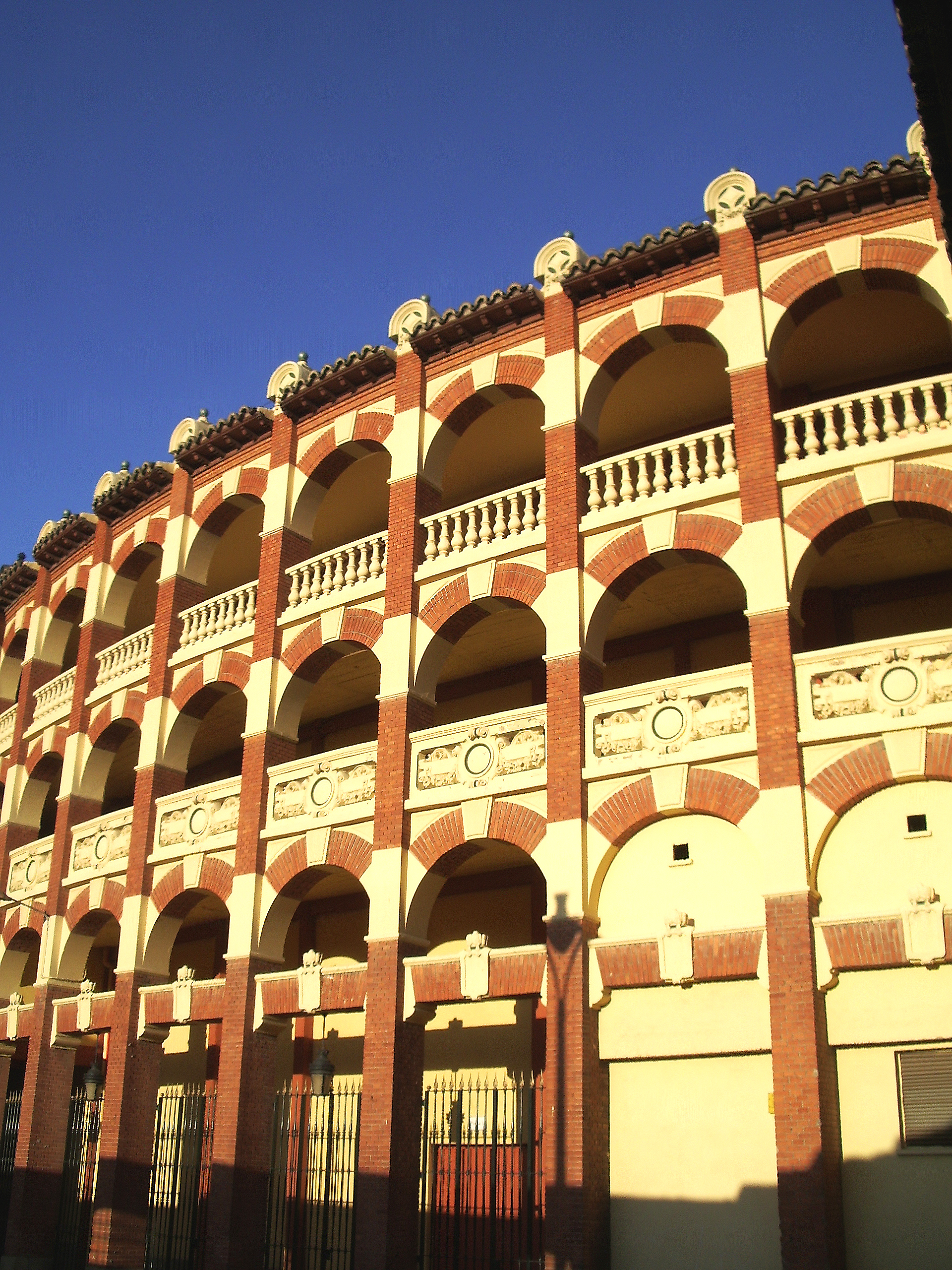 Plaza de Toros de la Misericordia de Zaragoza